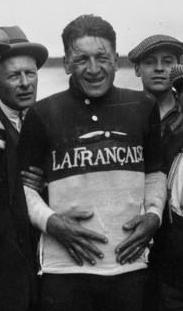 Monthléry, championnat de France (cyclisme) : abandon de Mauclair